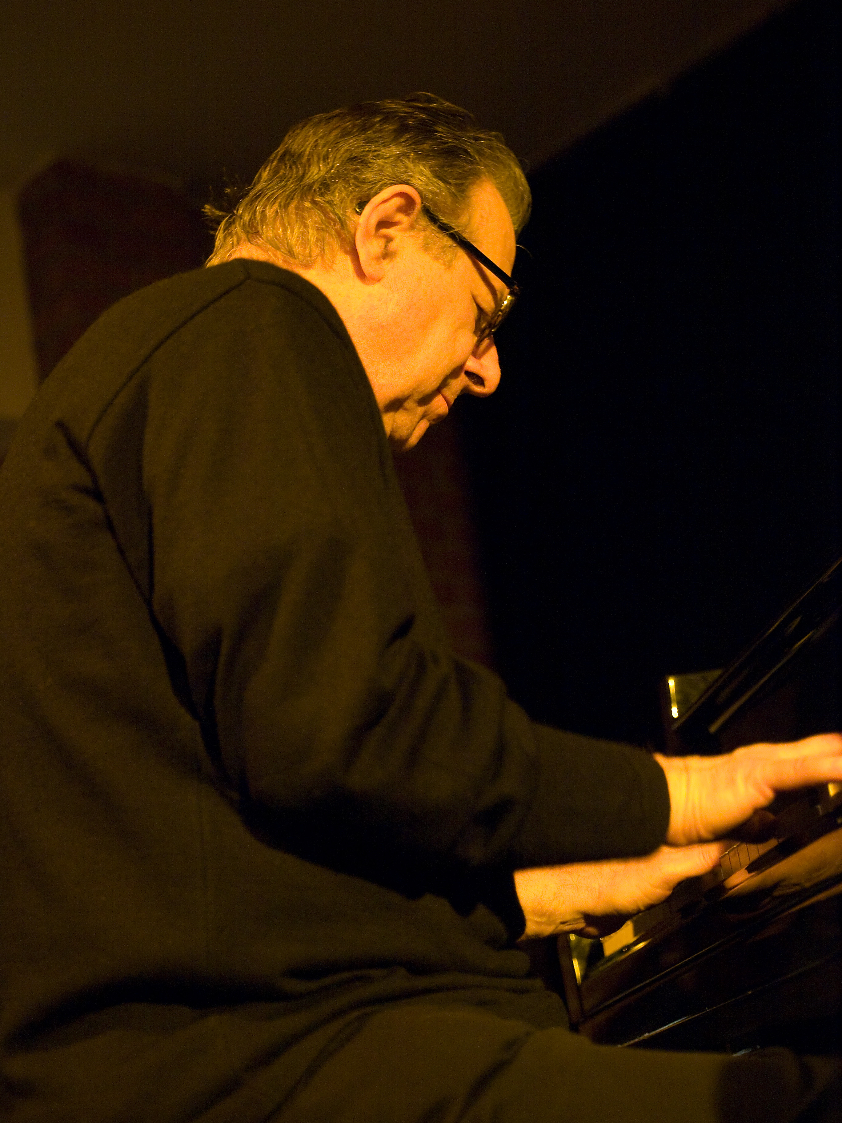 Fritz Pauer, piano, picture taken in Jazz club "Unterfahrt" in Munich/Germany